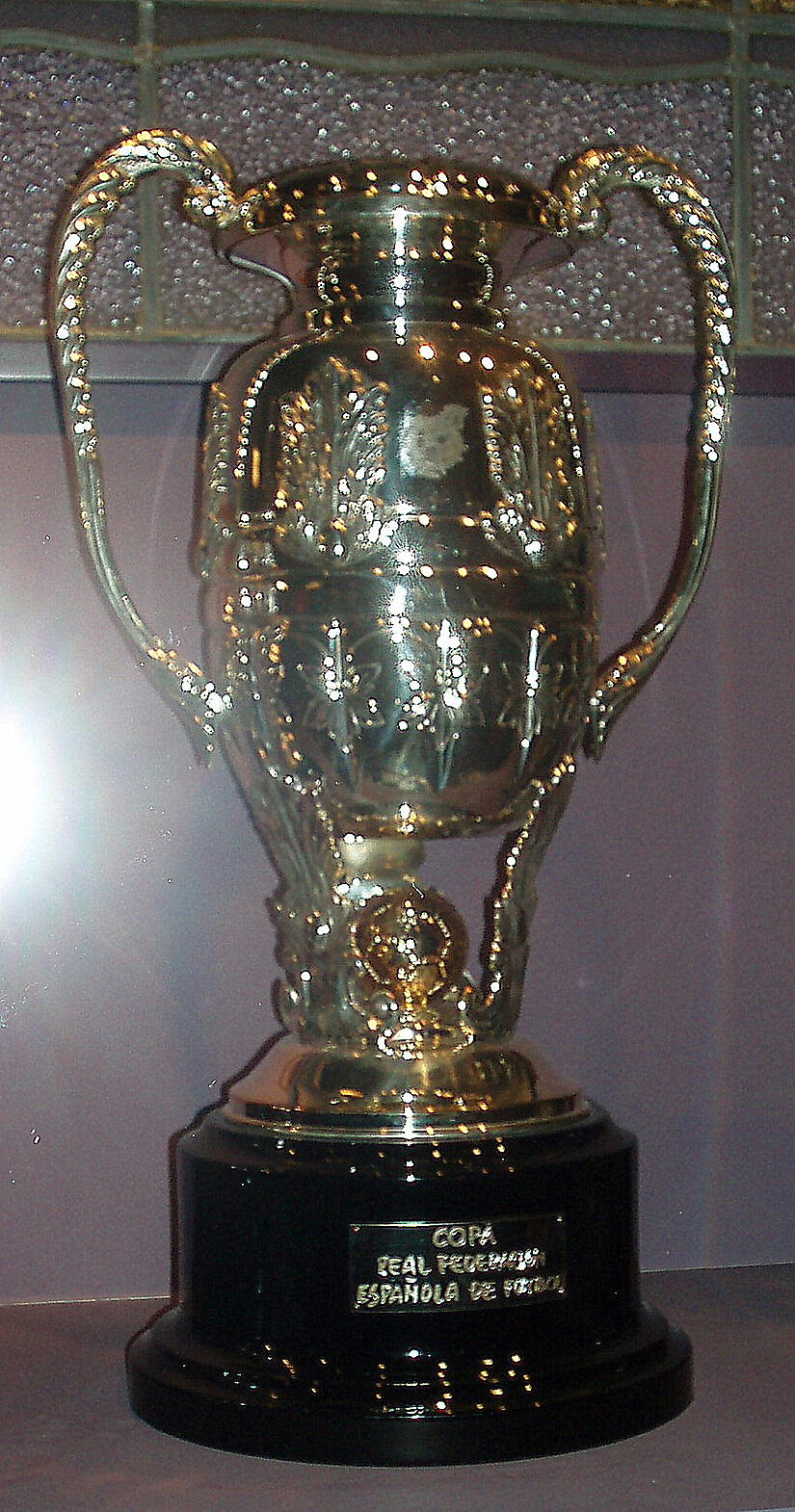 Copa Real Federación Española de Fútbol.